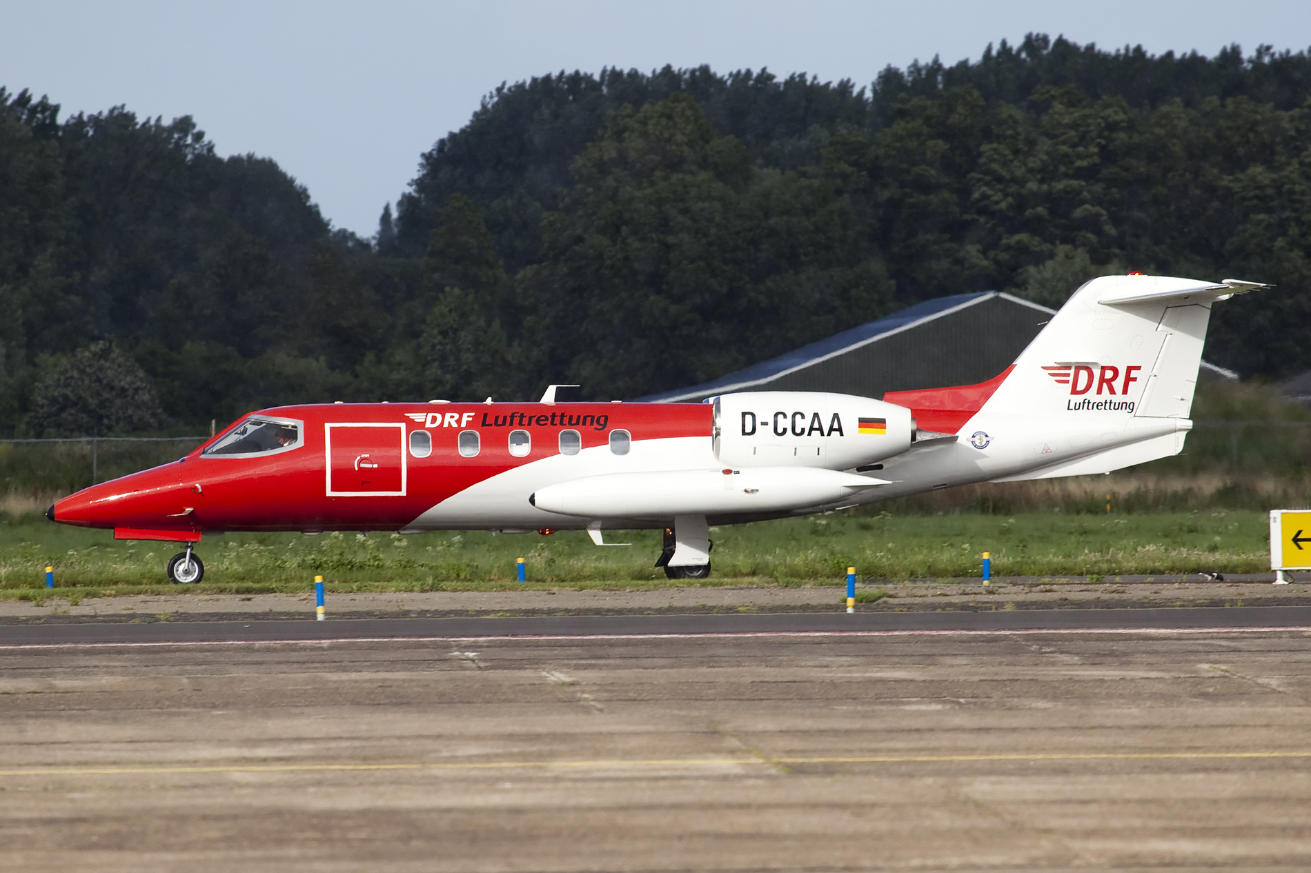 Rotterdam